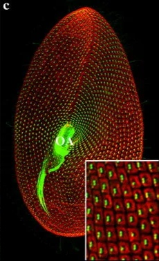 Figura 1. Patrón de cilios y cuerpos basales en Paramecium. Las imágenes son proyecciones de imágenes confocales tomadas a nivel del lado ventral de la célula. (c) Patrón de unidades corticales. Rojo: unidades de epiplasma, teñidas con un anticuerpo específico para epiplasminas; Verde: cuerpos basales marcados con una tubulina anti-poliglutamilada. OA aparato oral